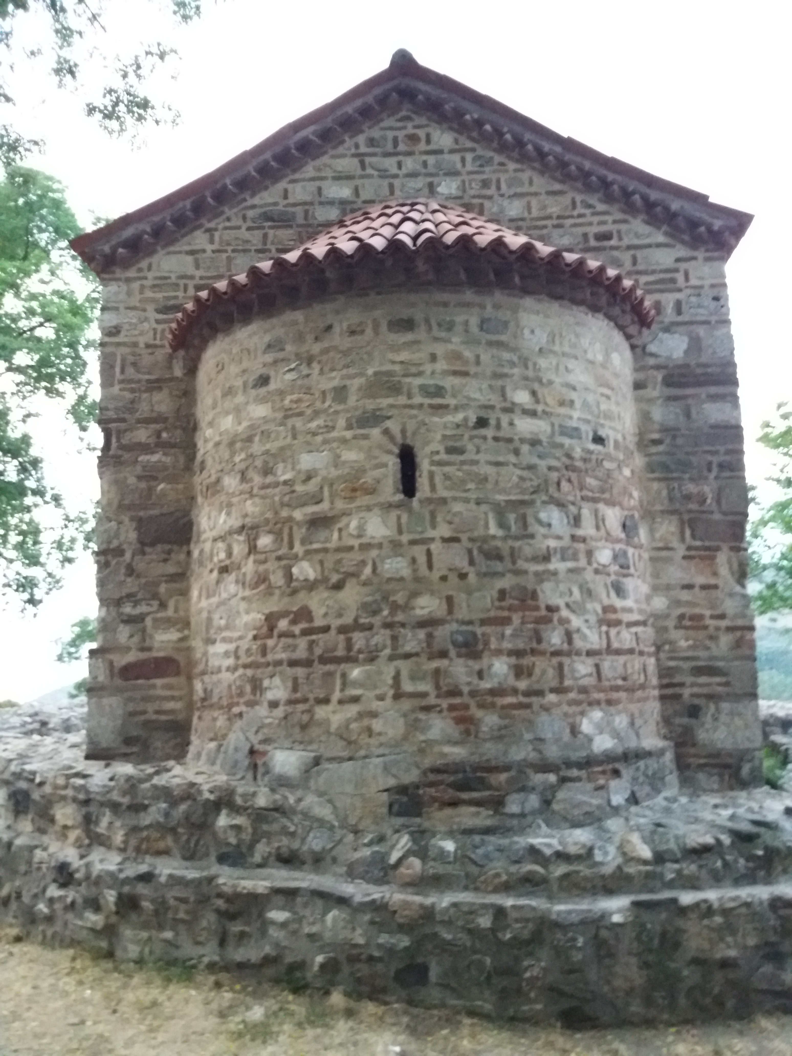 Srpski (latinica): Latinska crkva, Prokuplje